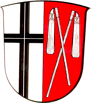 Wappen von DipperzWappenbeschreibung:“Das Wappen zeigt im gespaltenen Schild vorne in Silber ein durchgehendes schwarzes Kreuz, hinten in Rot zwei gekreuzte silberne Dreschflegel.”